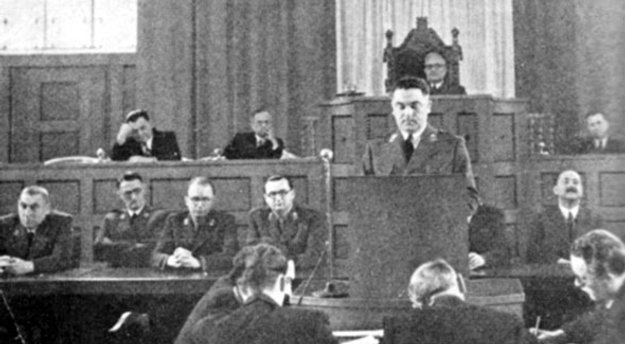 Andrija Artuković za govornicom